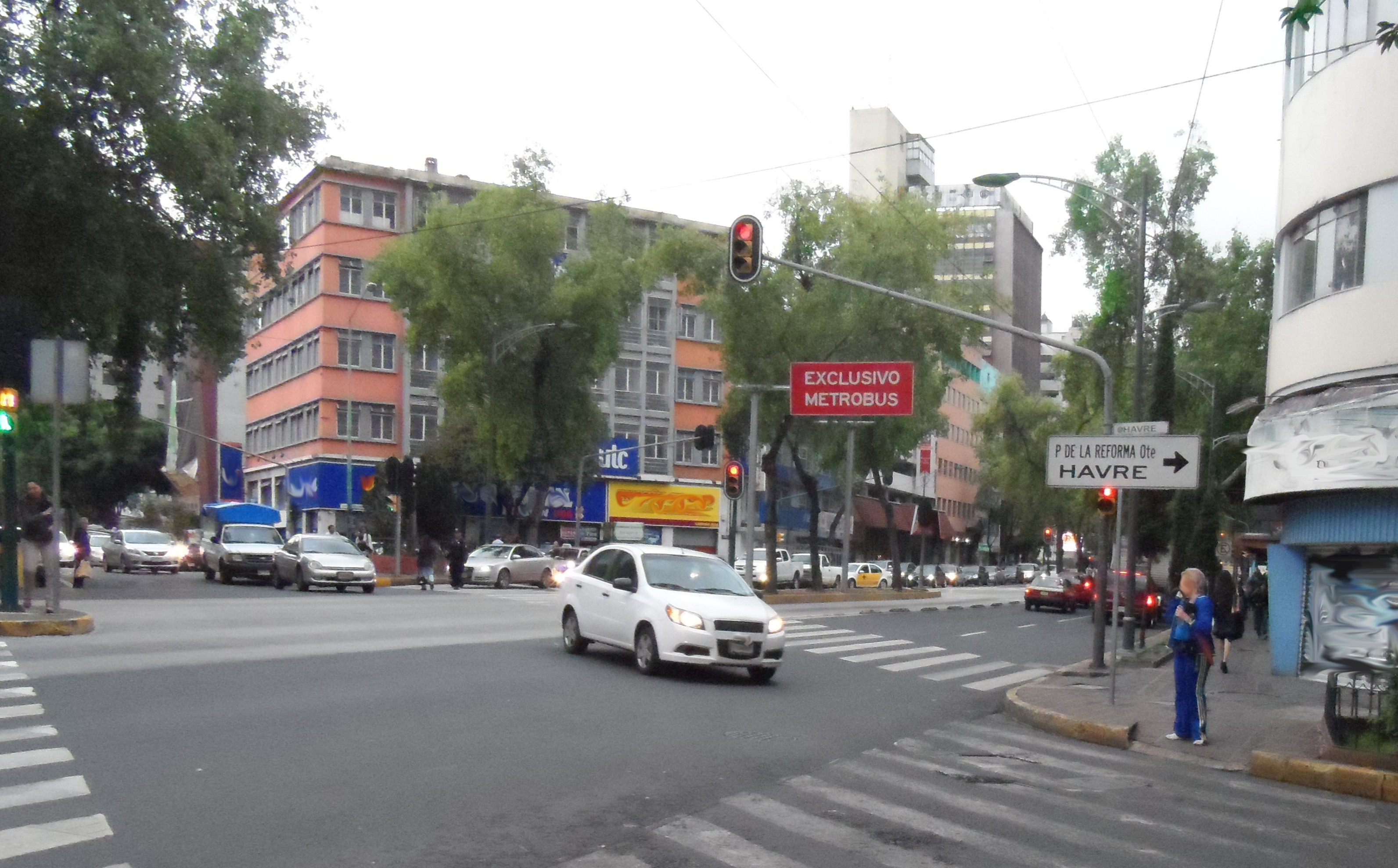 Vista de la Avenida de los Insurgentes Centro a la altura de la calle de Hamburgo (recorte).